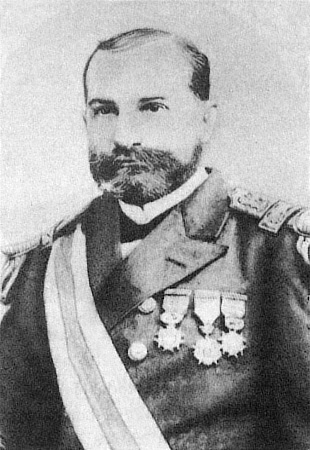 Jorge Montt's portrait